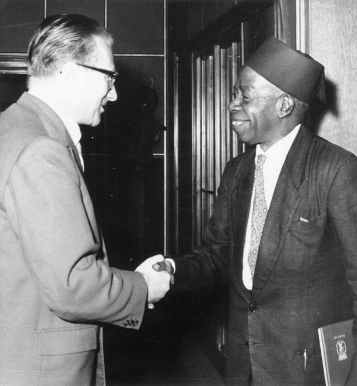 Zentralbild/Franke, 9.10.1964 Berlin: Delegation aus Sansibar von Kurt Thieme empfangen Der ständige Stellvertreter des Oberbürgermeisters von Berlin, Kurt Thieme, empfing am 9.10.1964 im Roten Rathaus die Mitglieder der Regierungsdelegation aus Sansibar, die anläßlich des 15. Jahrestages in der DDR weilten. UBz: Kurt Thieme begrüßt Mtoro Rehani, Herausgeber der Zeitung "Afrika Kwetu" und Vizepräsident der Afro-Shirazi-Partei.